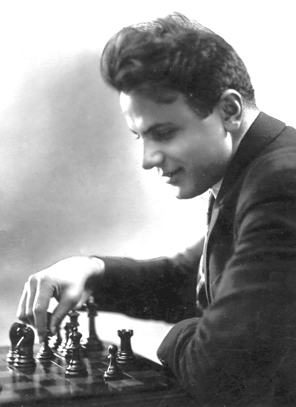 Имя при рождении-Виктор Гоглидзе Дата рождения 27 ноября 1905 Место рождения станция Урсатьевская Узбекистан Дата смерти 22 сентября 1964 Место смерти Тбилиси Гражданство-Грузия